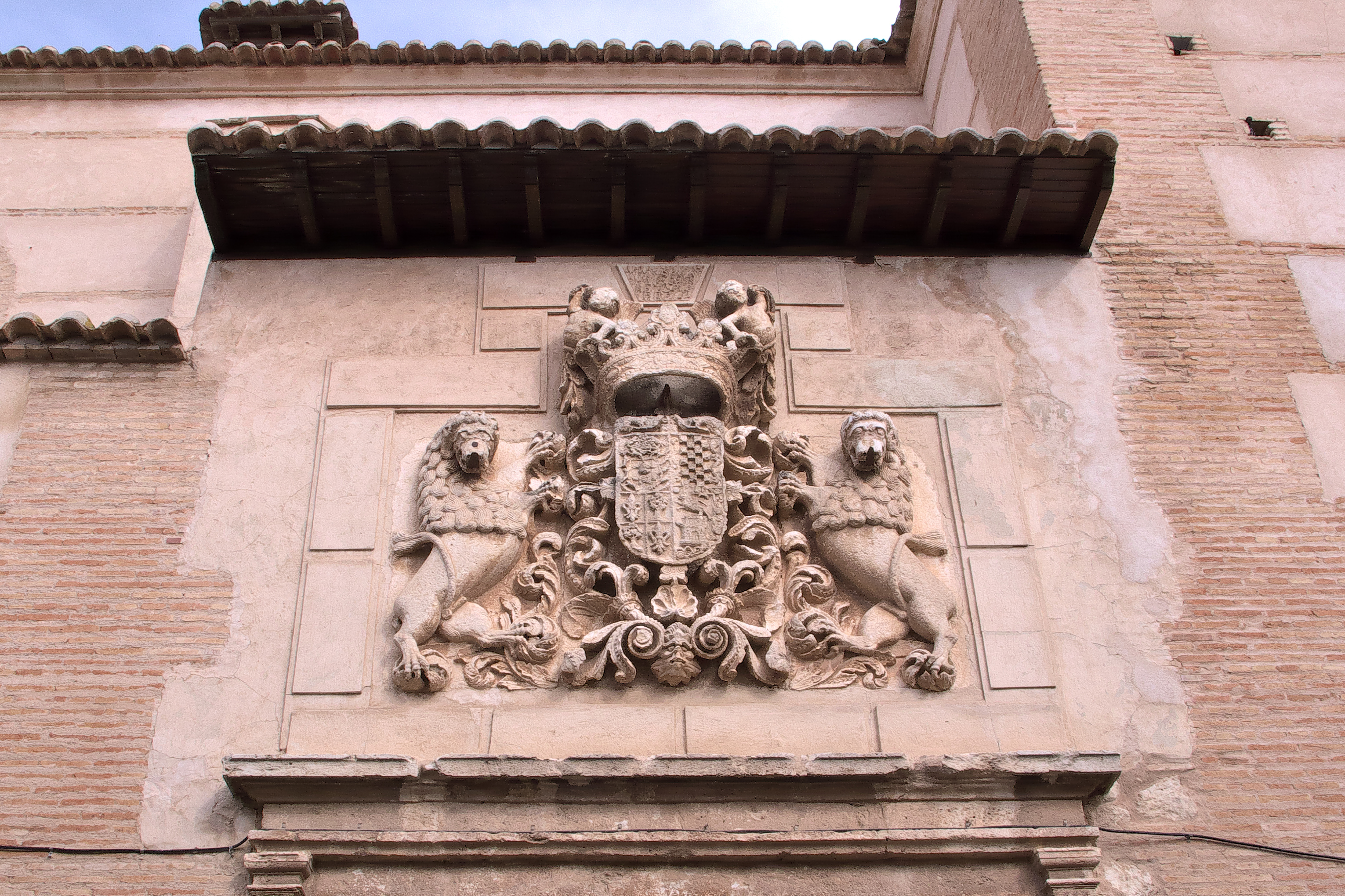 Escudo de los Condes de Valdeparaiso, patronos del convento dominico.